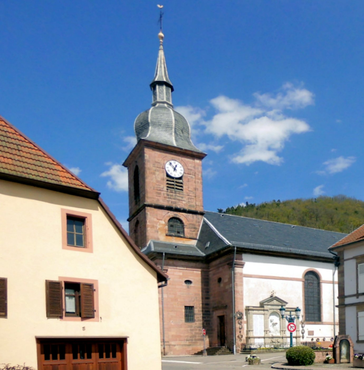 L'église Saint-Nicolas à Sainte-Croix-aux-Mines